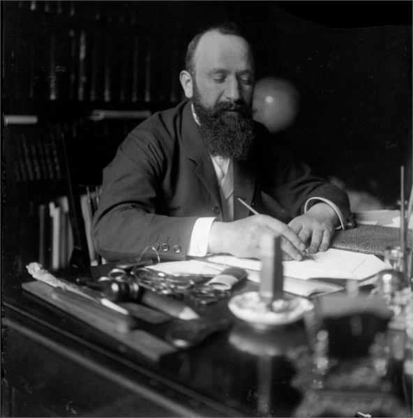 ד"ר דוד וולפסון